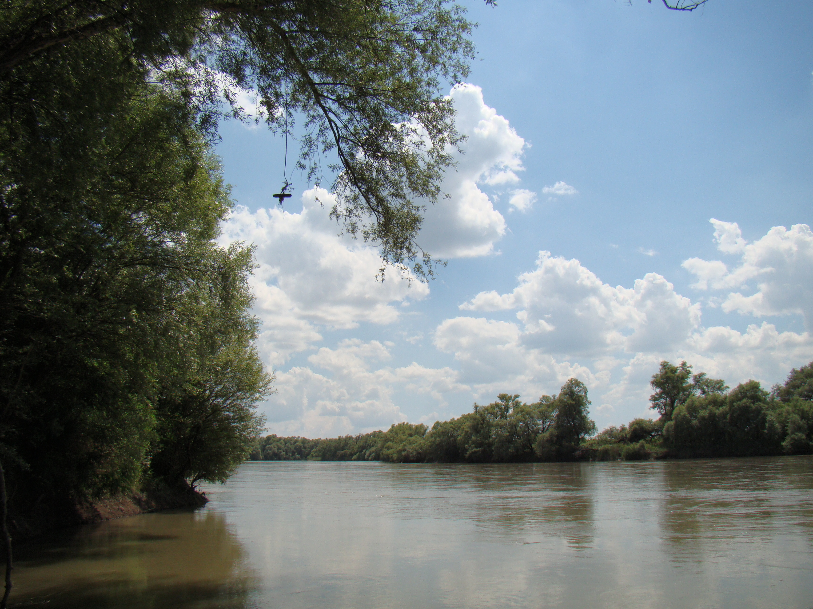 Река Лаба в районе хутора Огонёк, Усть-Лабинский район.